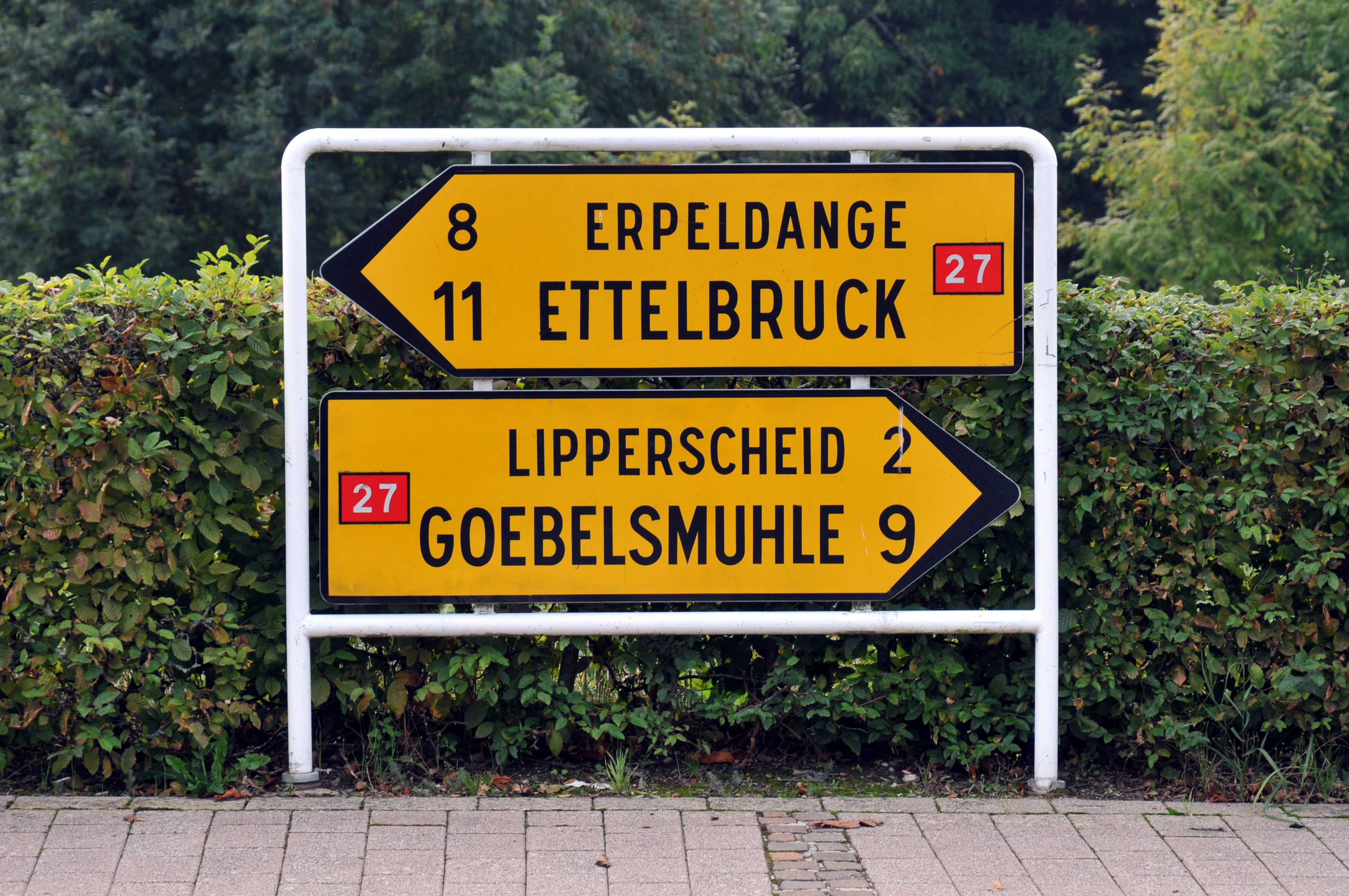 Stroosseschëlter op der Nationalstrooss 27 zu Méchela.